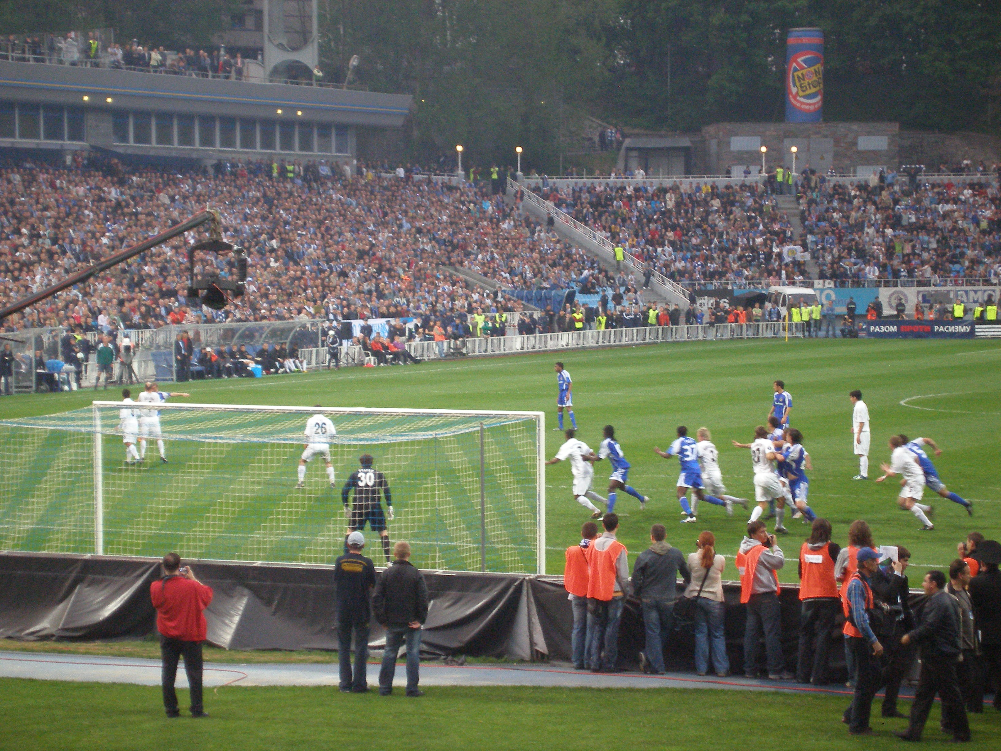 Матч «Динамо» Київ — «Шахтар» Донецьк. Через кілька секунд динамівці заб'ють гол у ворота П'ятова